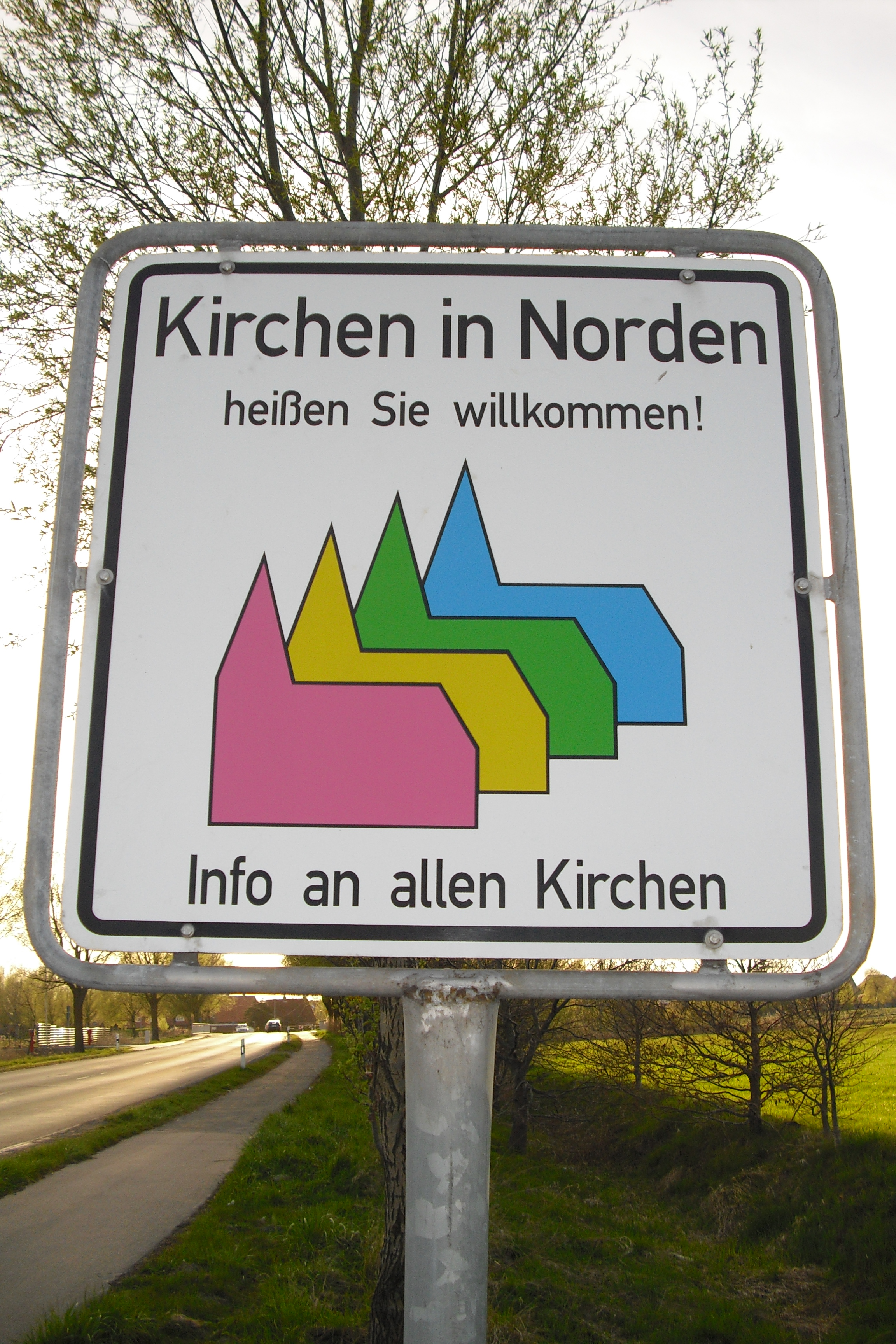 Ökumenisches Hinweisschild an den Orteingängen in Norden (Ostfriesland)